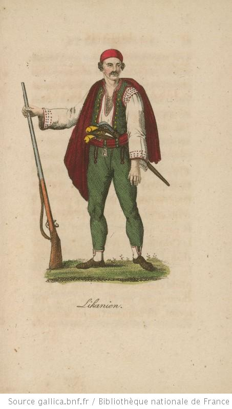 Likanien (Croats. Likani. Hrvati)